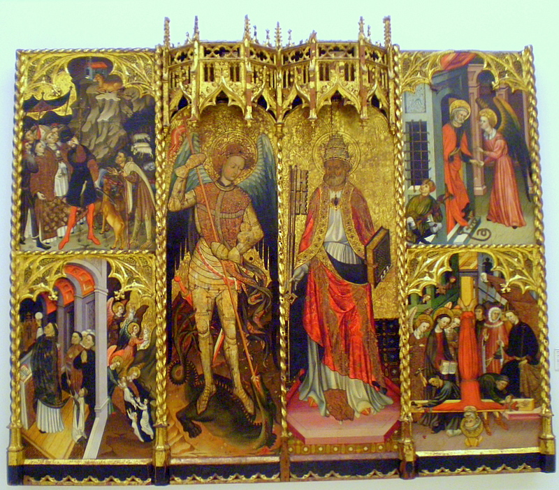 COS CENTRAL DEL RETAULE DE SANT MIQUEL I SANT PERE. Procedeix del retaule de l´altar major de l´església de Sant Miquel de la Seu d´Urgell (Alt Urgell)